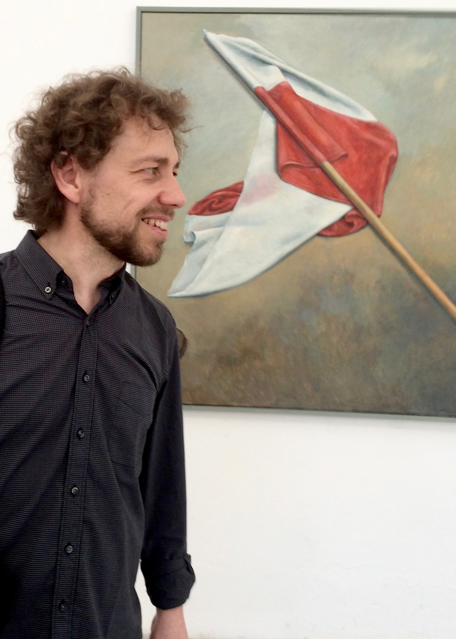 Piotr Drozdowicz in front of his work at the exhibition "Historiofilia" (Warsaw, 2017)